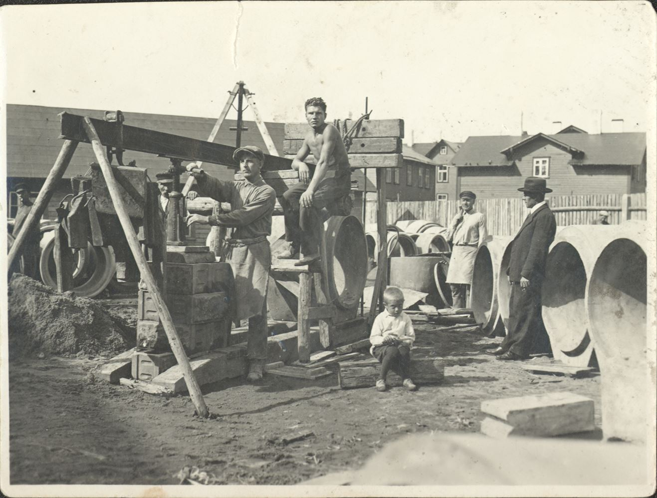 Jaan Vanaveski tsementesemete tööstus Ristiku 11 õuel